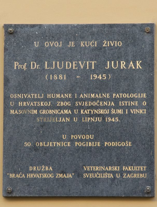 Spomen-ploča na kući Kallina u Zagrebu